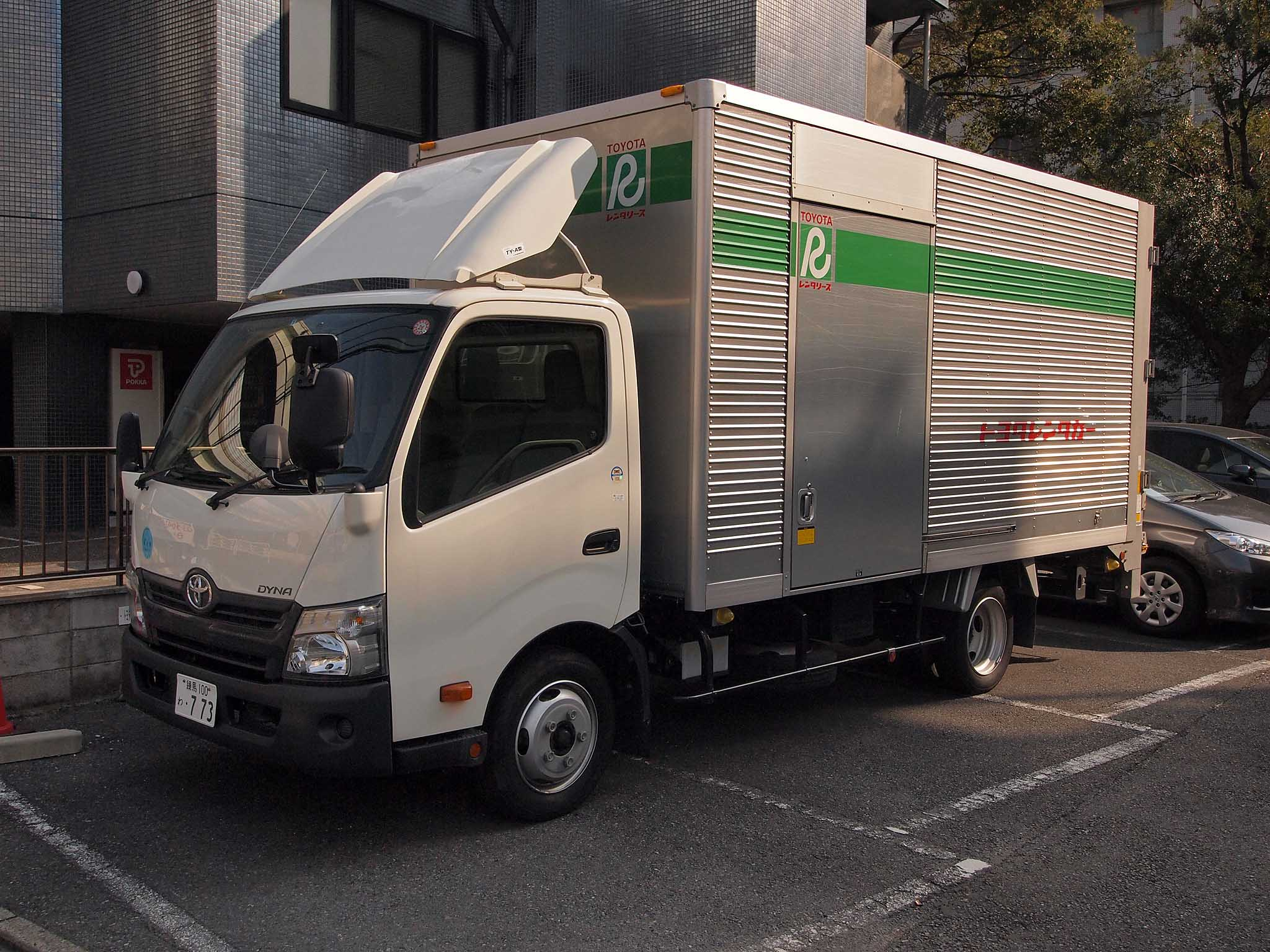 トヨタレンタカーのダイナワイドキャブドライバン。 登録番号：練馬100わ・773